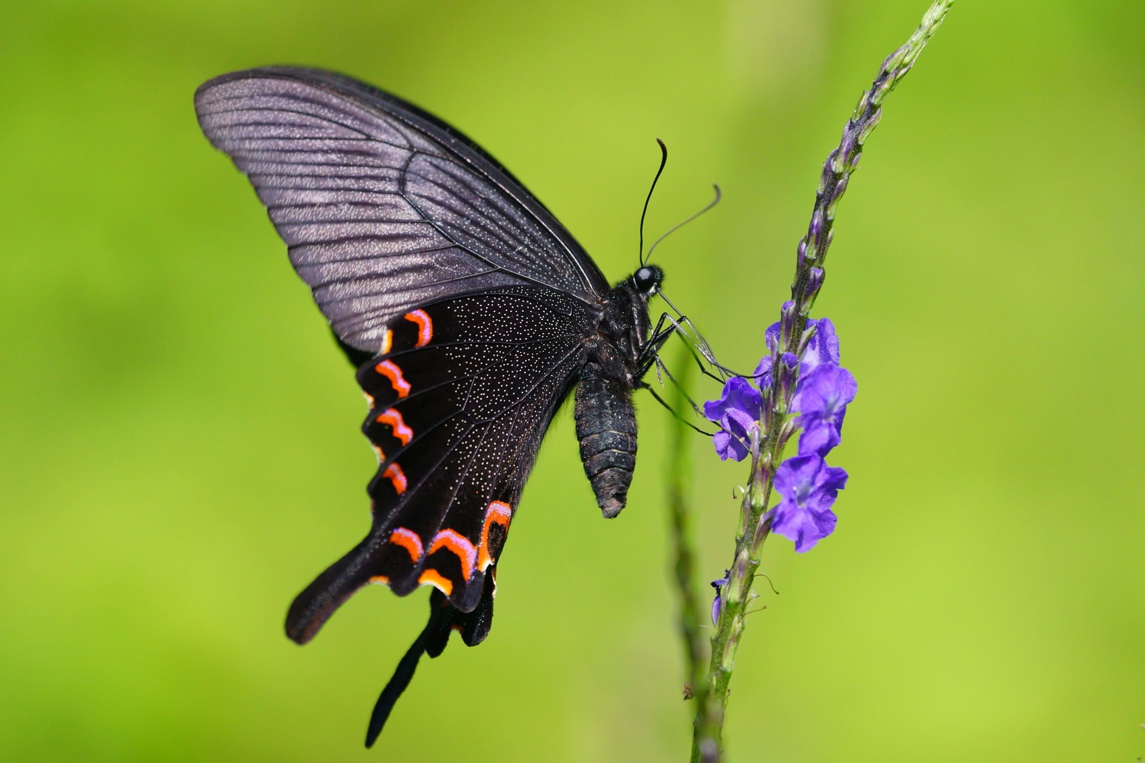 翠鳳蝶 Papilio bianor thrasymedes